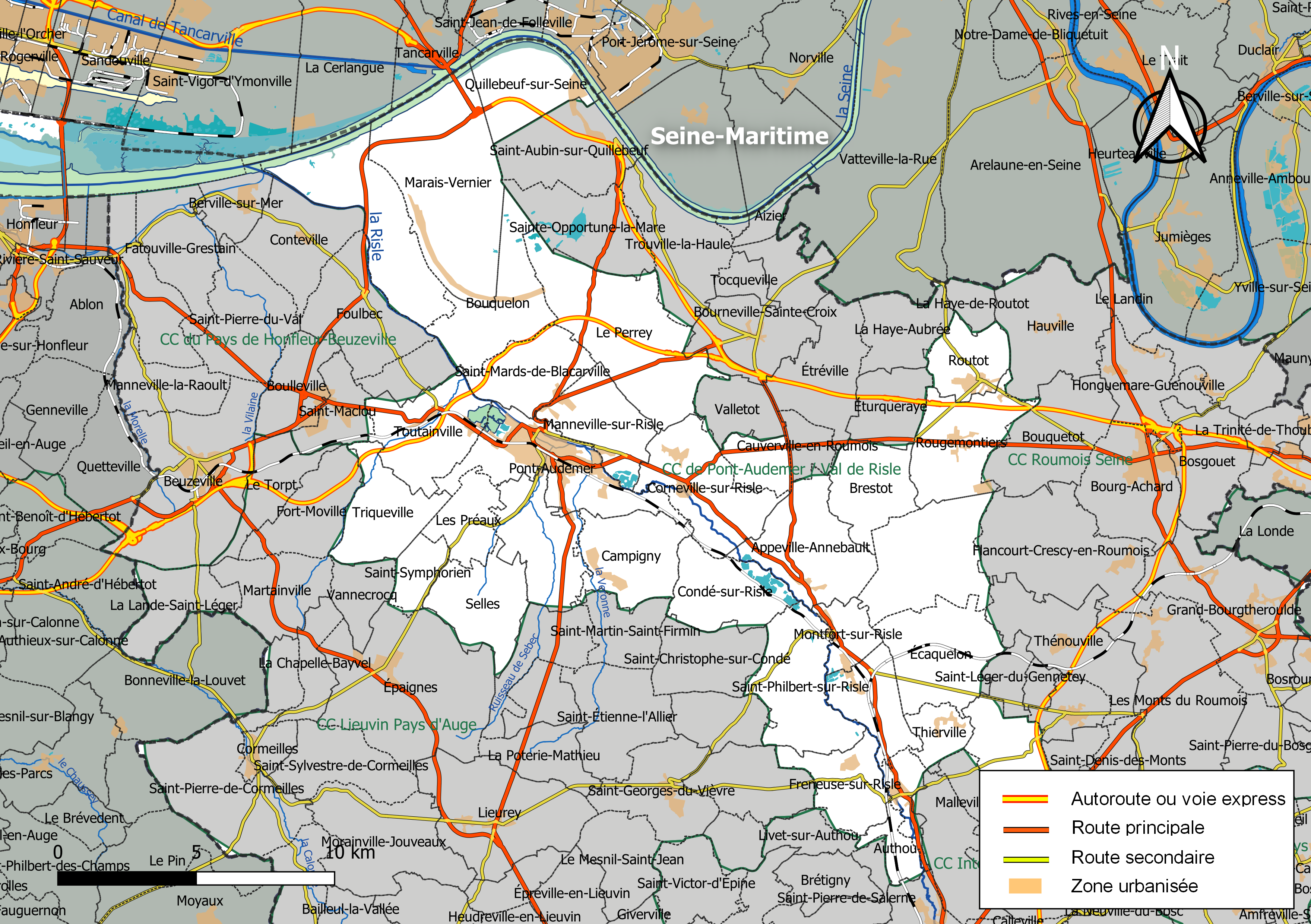 Carte géographique de la Communauté de communes de Pont-Audemer / Val de Risle, département de l'Eure, France. Composition au 1er janvier 2019.